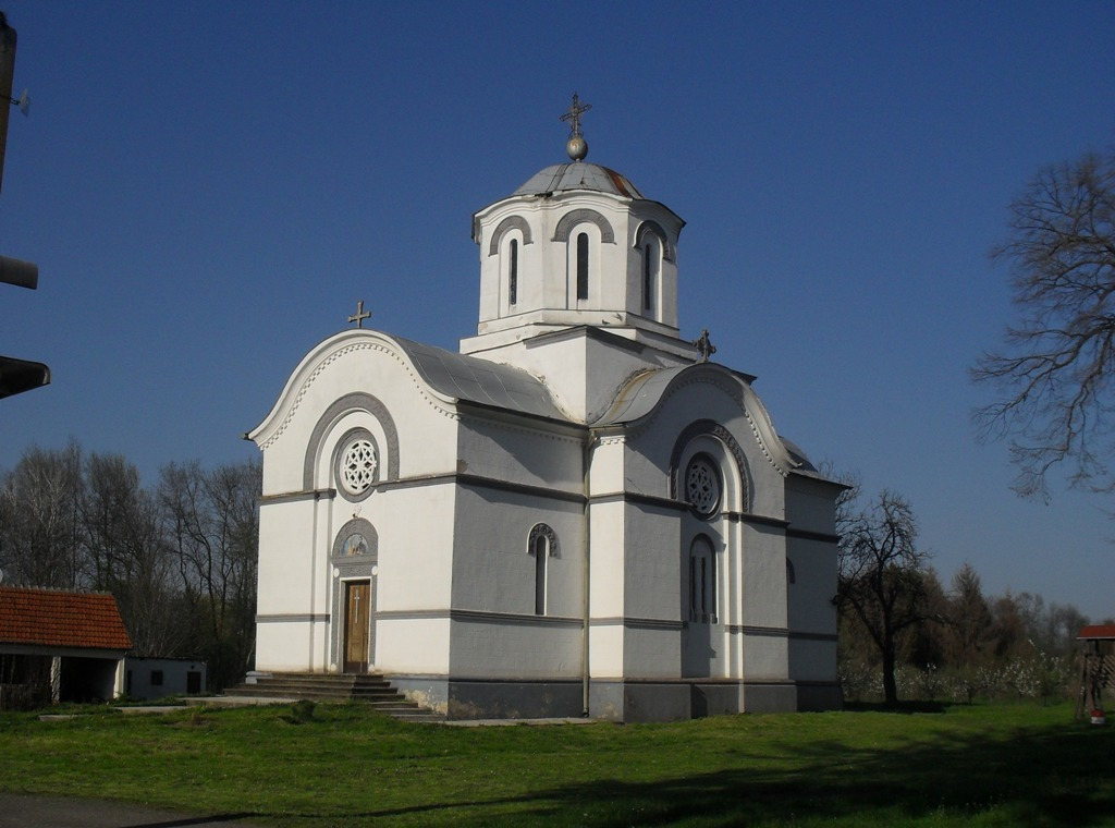 Храм СПЦ Св. апостола Петра и Павла, Глоговац, Мачва, Србија